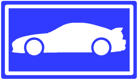 これは、クーペ型自動車を交通標識のように描いたものです。